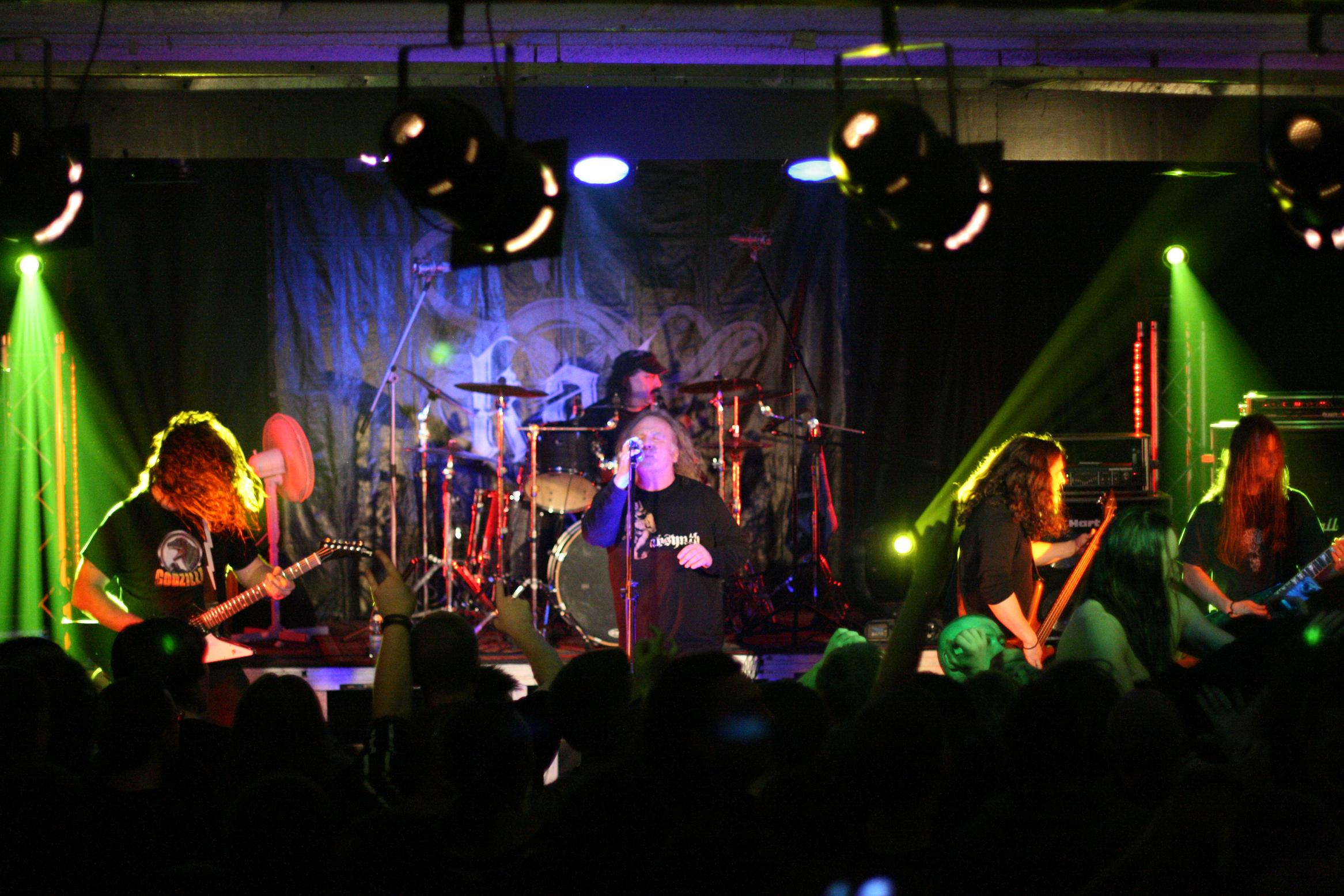 Zdęcie zrobione podczas koncertu w szczecinie